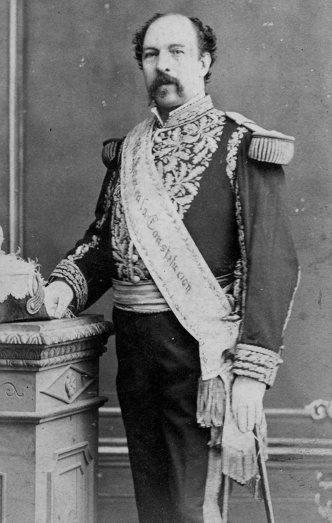 Fotografía oficial del presidente de la República del Ecuador, Gral. Ignacio de Veintimilla (circa 1885).